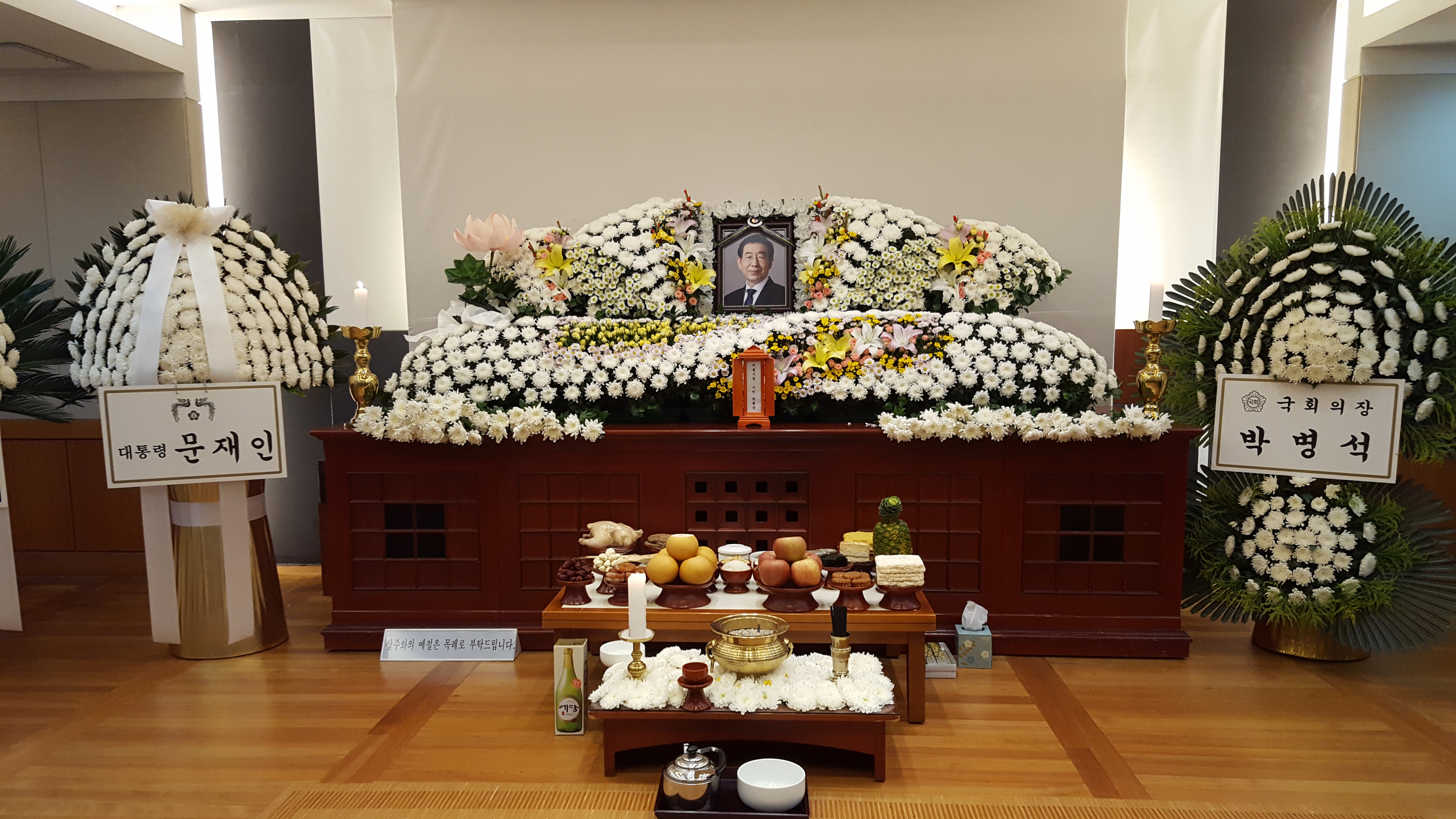 서울 종로구 연건동 서울대병원 장례식장에 마련된 박원순 서울시장 빈소